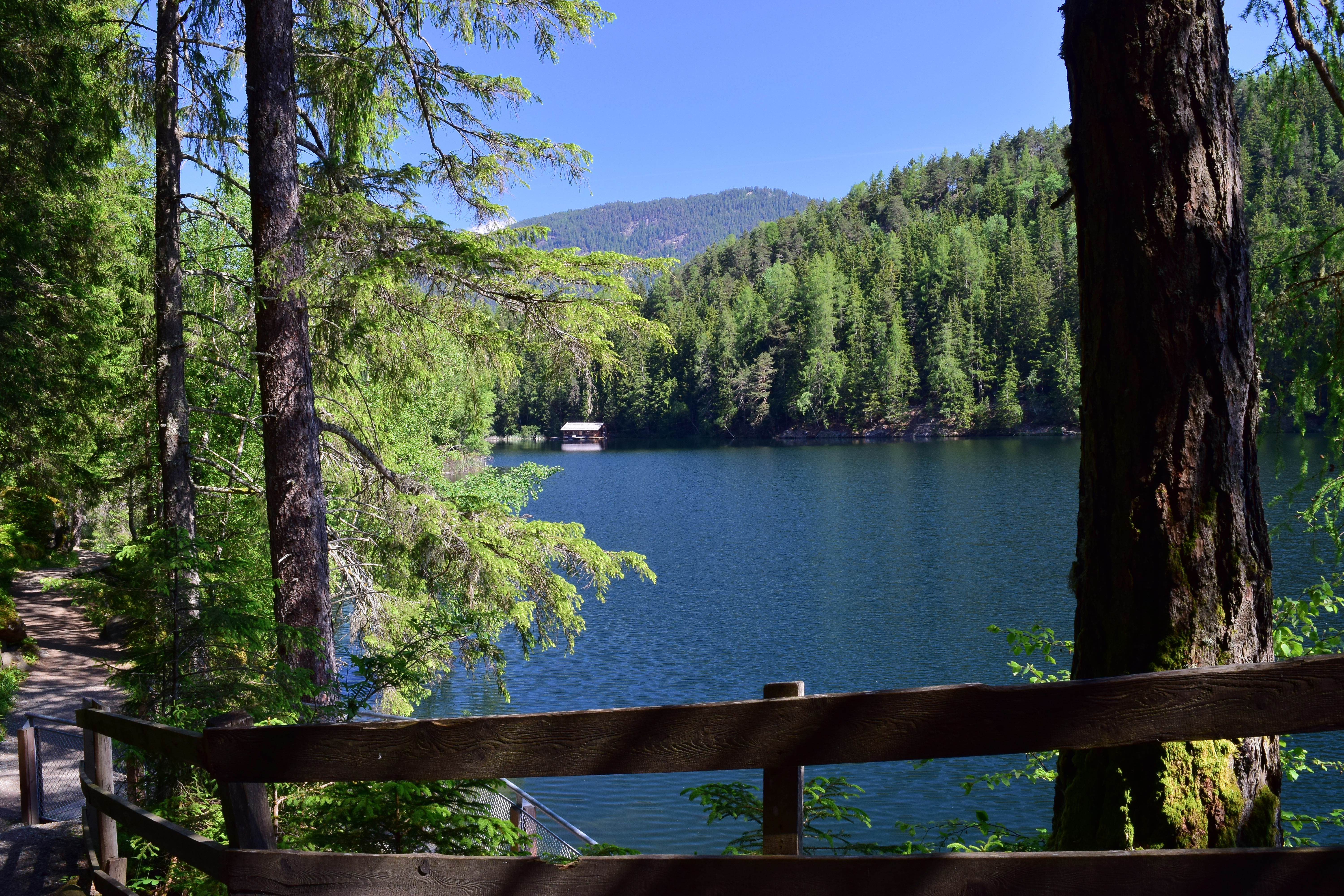 Das Landschaftsschutzgebiet Achstürze-Piburger See ist Teil des Naturparks Ötztal, der Piburger See selbst ist ein Naturdenkmal. This media shows the natural monument in the Tyrol with the ID ND_2_2. This file shows the Nature Park with the ID 7122 in Austria.